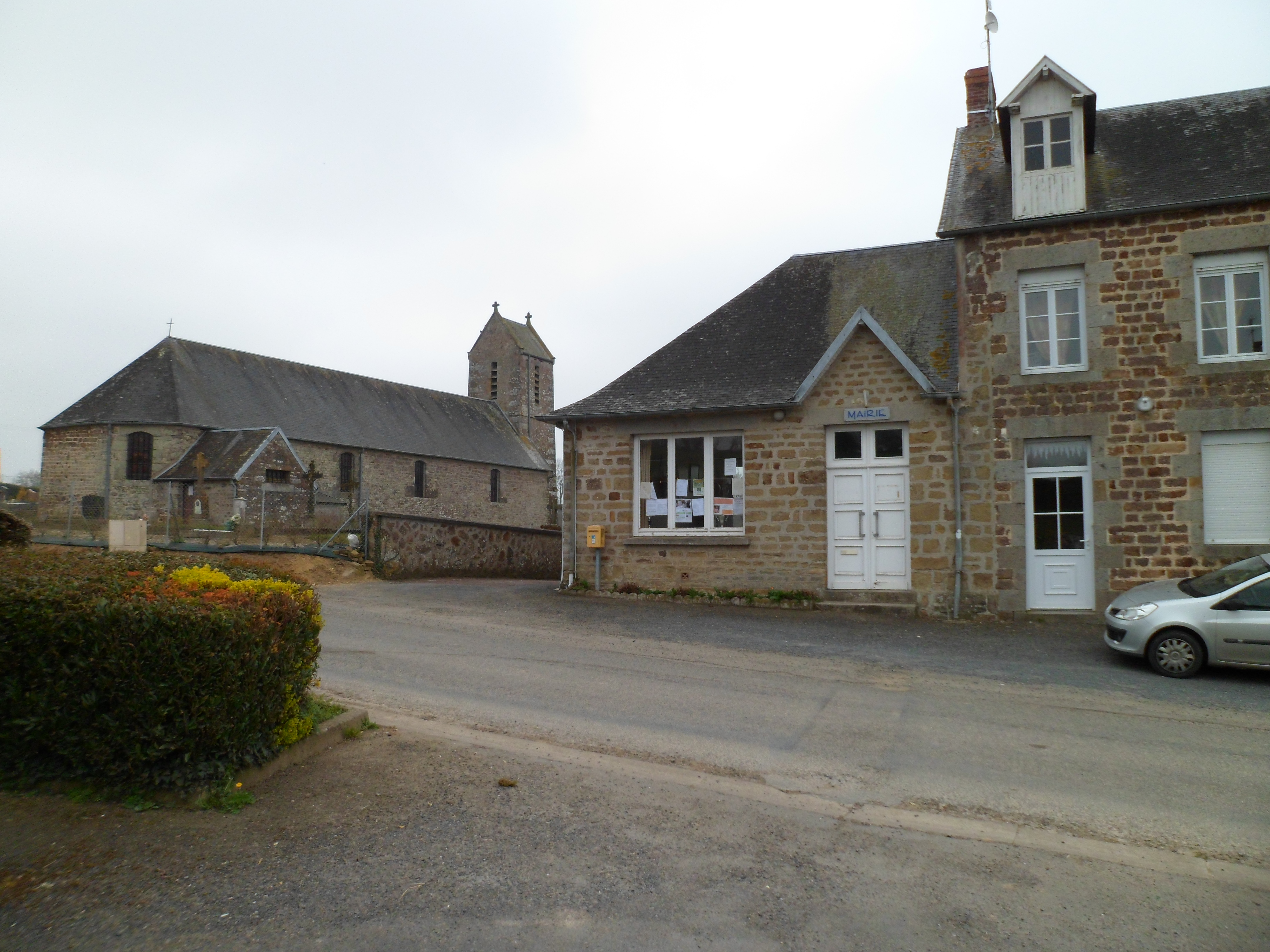 Beaucoudray